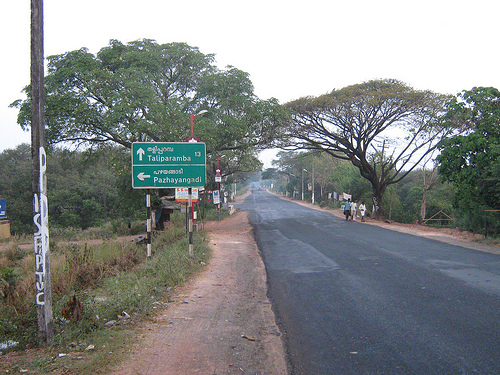 Kannur, Kerala, India.